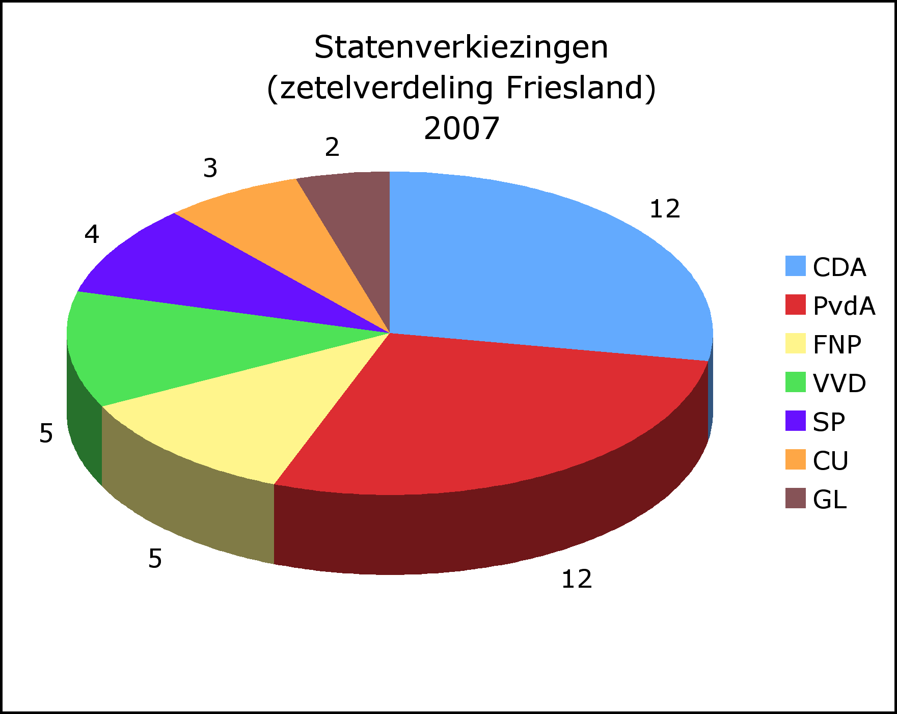 Uitslag provinciale statenverkiezingen Friesland vertaald in zetels